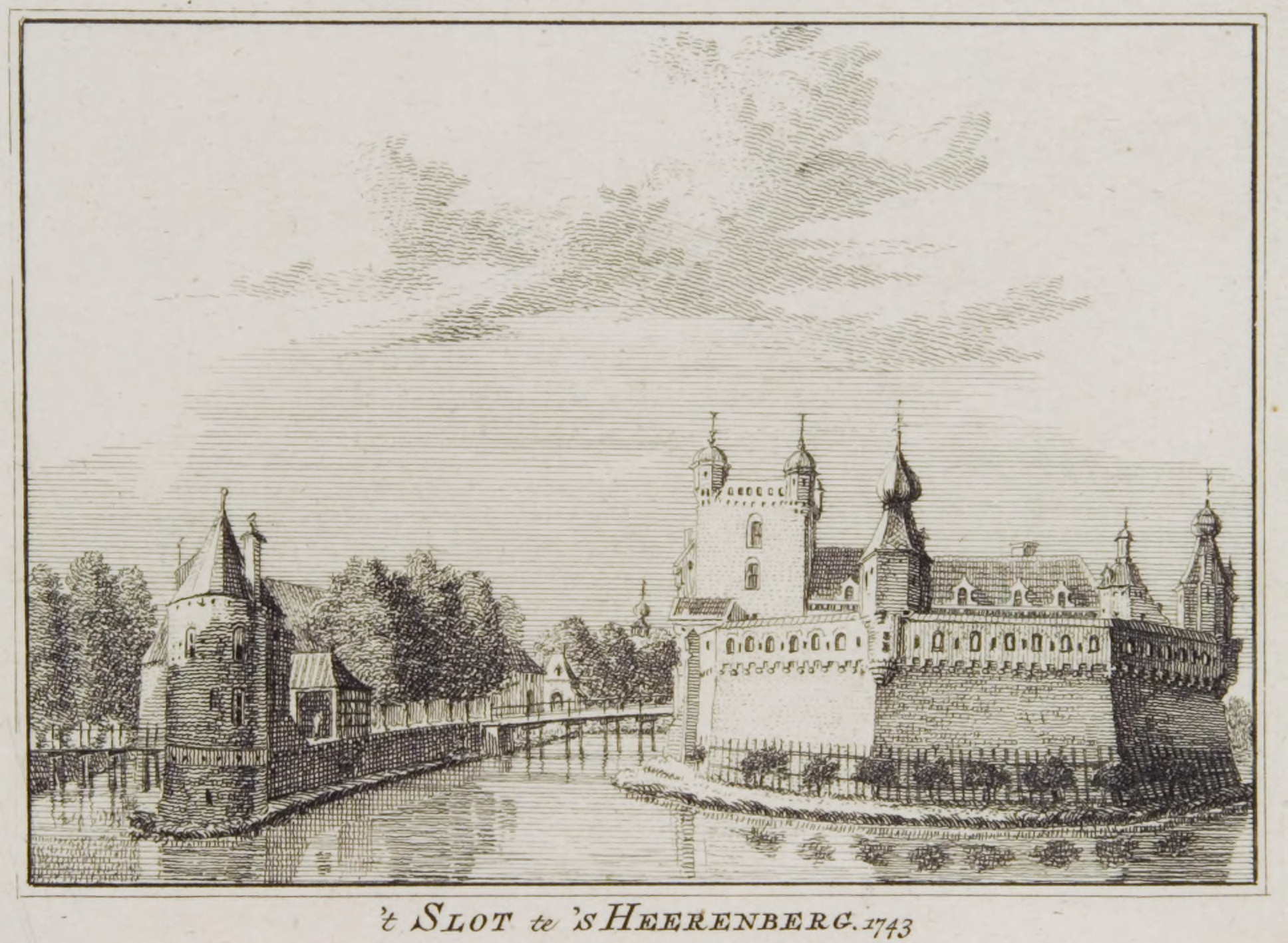 De weermuur met hangtoren van het Kasteel 's Heerenberg